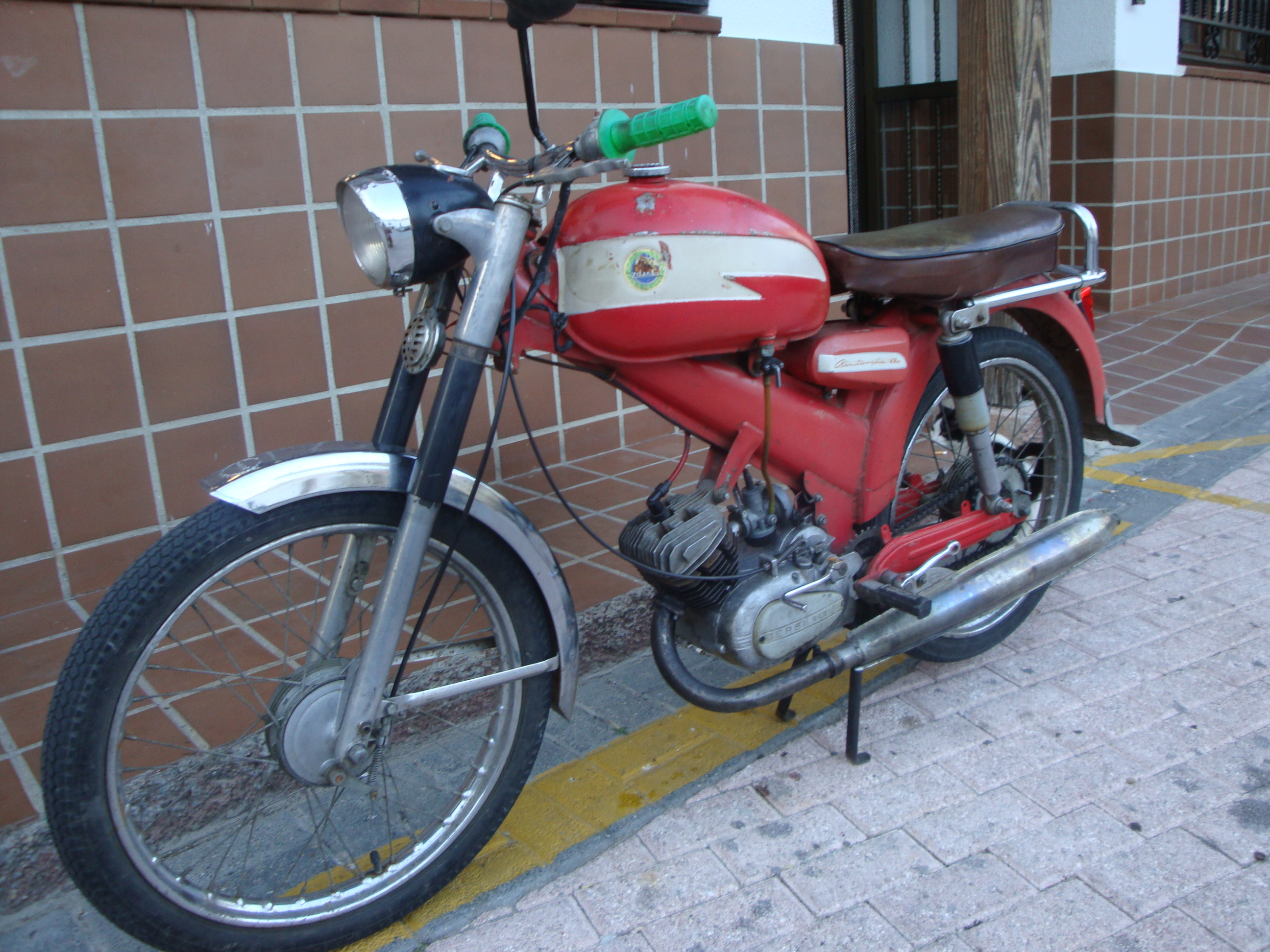 Motocicleta Derbi 49 cc Modelo 1954